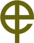 Ailtirí na hAiséirghe